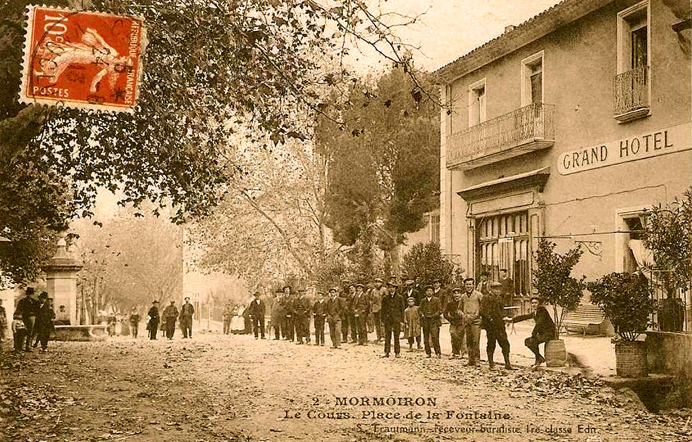 Place de la Fontaine et Grand Hôtel sur le Cours de Mormoiron